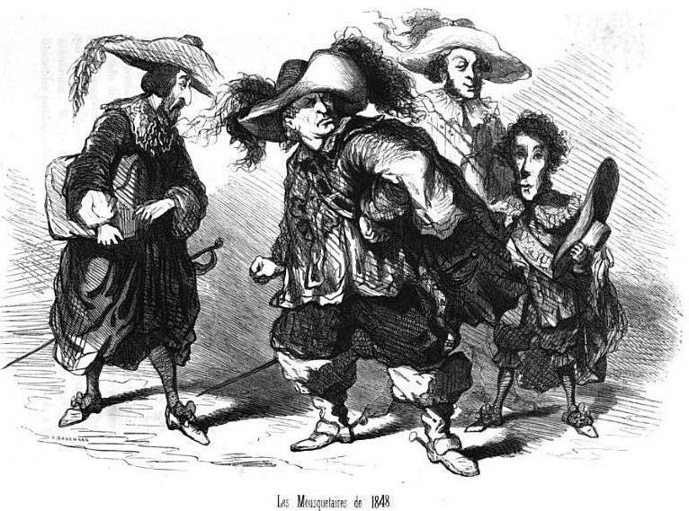 "Les Mousquetaires de 1848" par Cham. De gauche à droite : Falloux en Aramis, Odilon Barrot en Athos, Buffet en Porthos, et Léon Faucher en d'Artagnan.